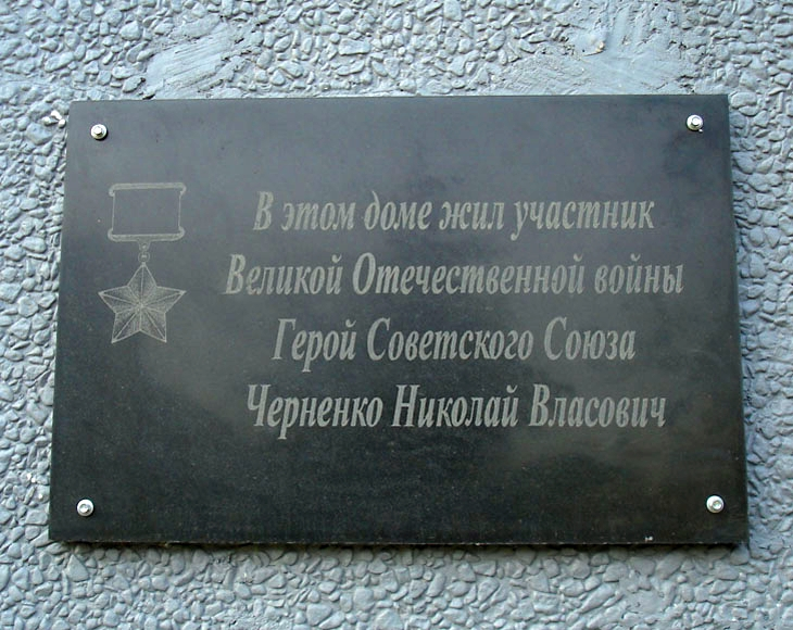 Мемориальная доска Черненко в Тольятти